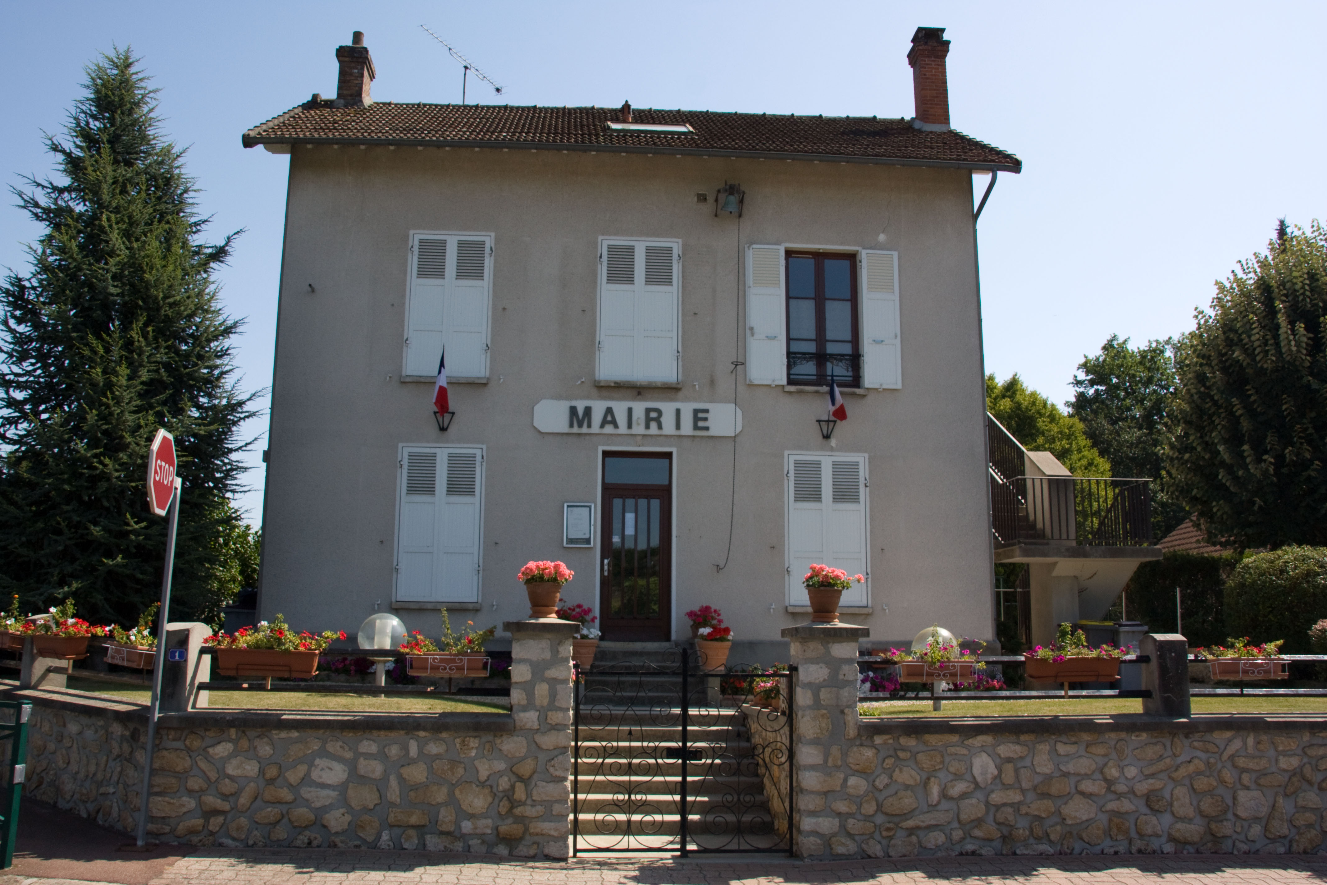 Mairie de Prunay-sur-Essonne, Prunay-sur-Essonne, Essonne, France